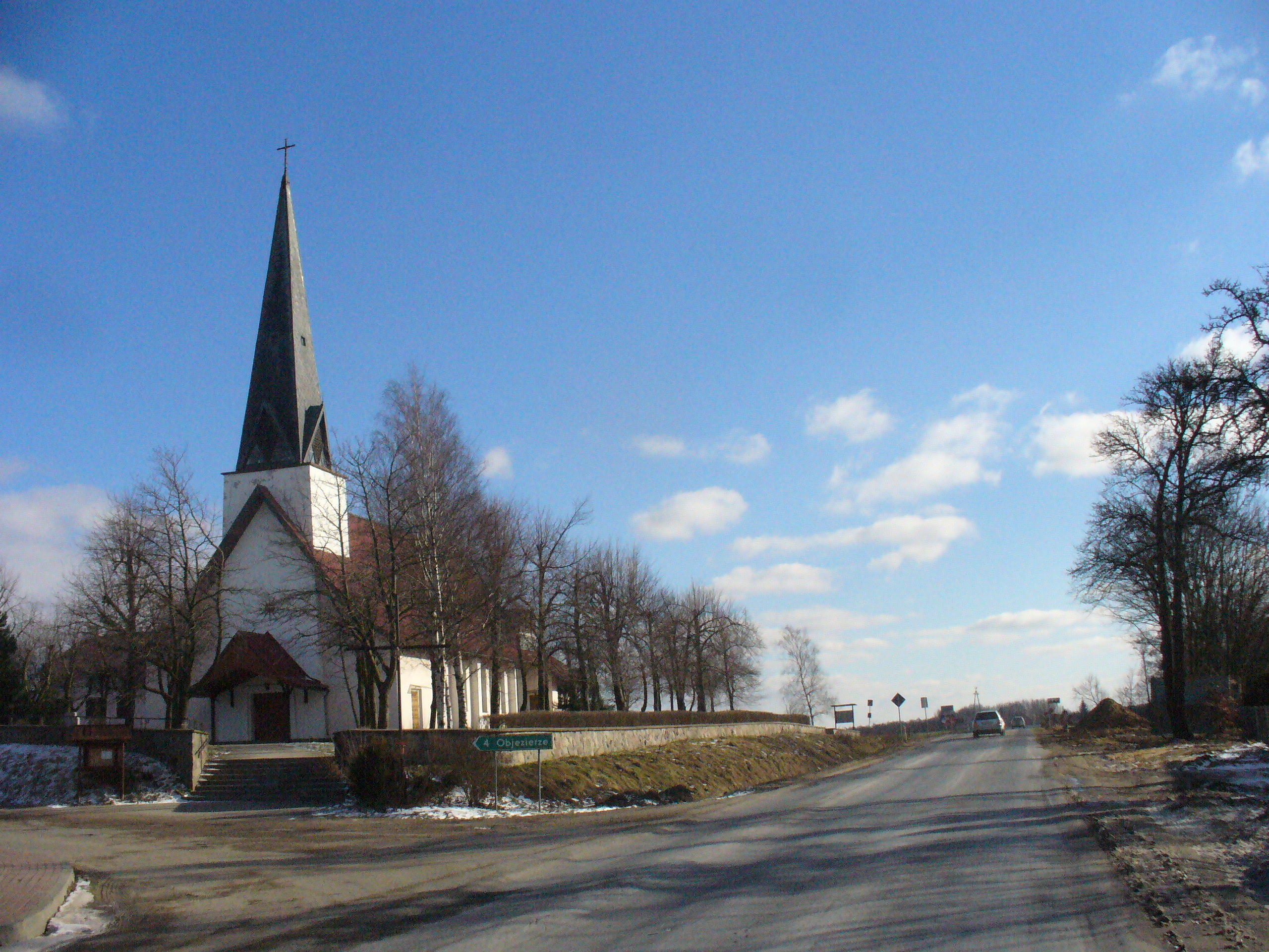 Kościół w Silnie na Pomorzu przy wylotówce na Tucholę